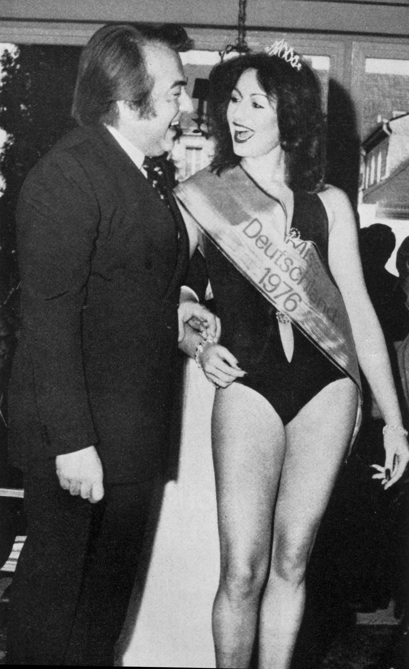 Lachmann Fourrures, Hans-Joachim & Katrin Lachmann, Wiesbaden, Adventstreffen Dezember 1976. Herr Lachmann und Miss Germany 1976 Monika Schneeweis.